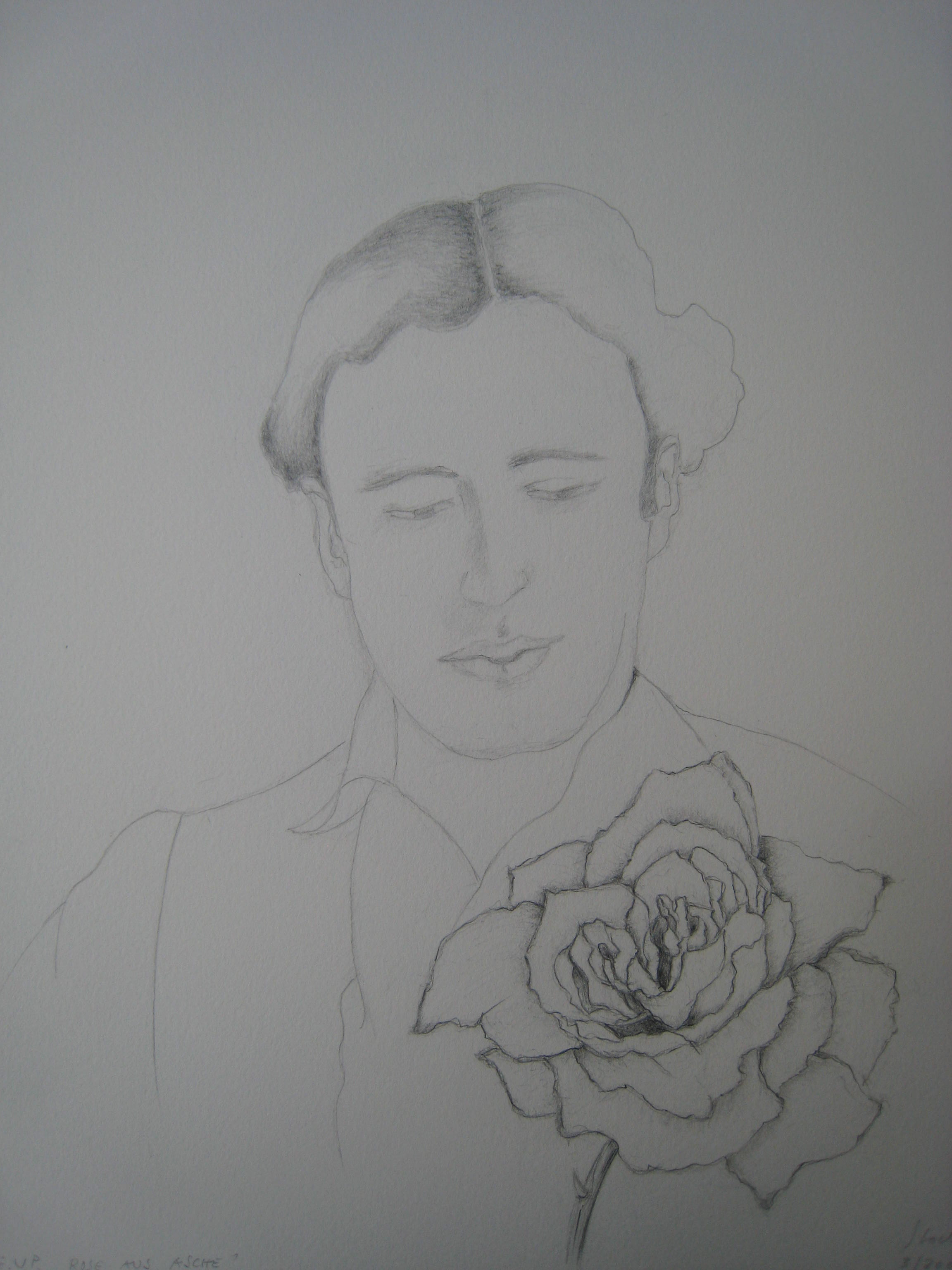 Erwin Walter Palm, Rose aus Asche von Ursula Stock, Zeichnung, Höhe x Breite: 35 x 25 cm, 2006.